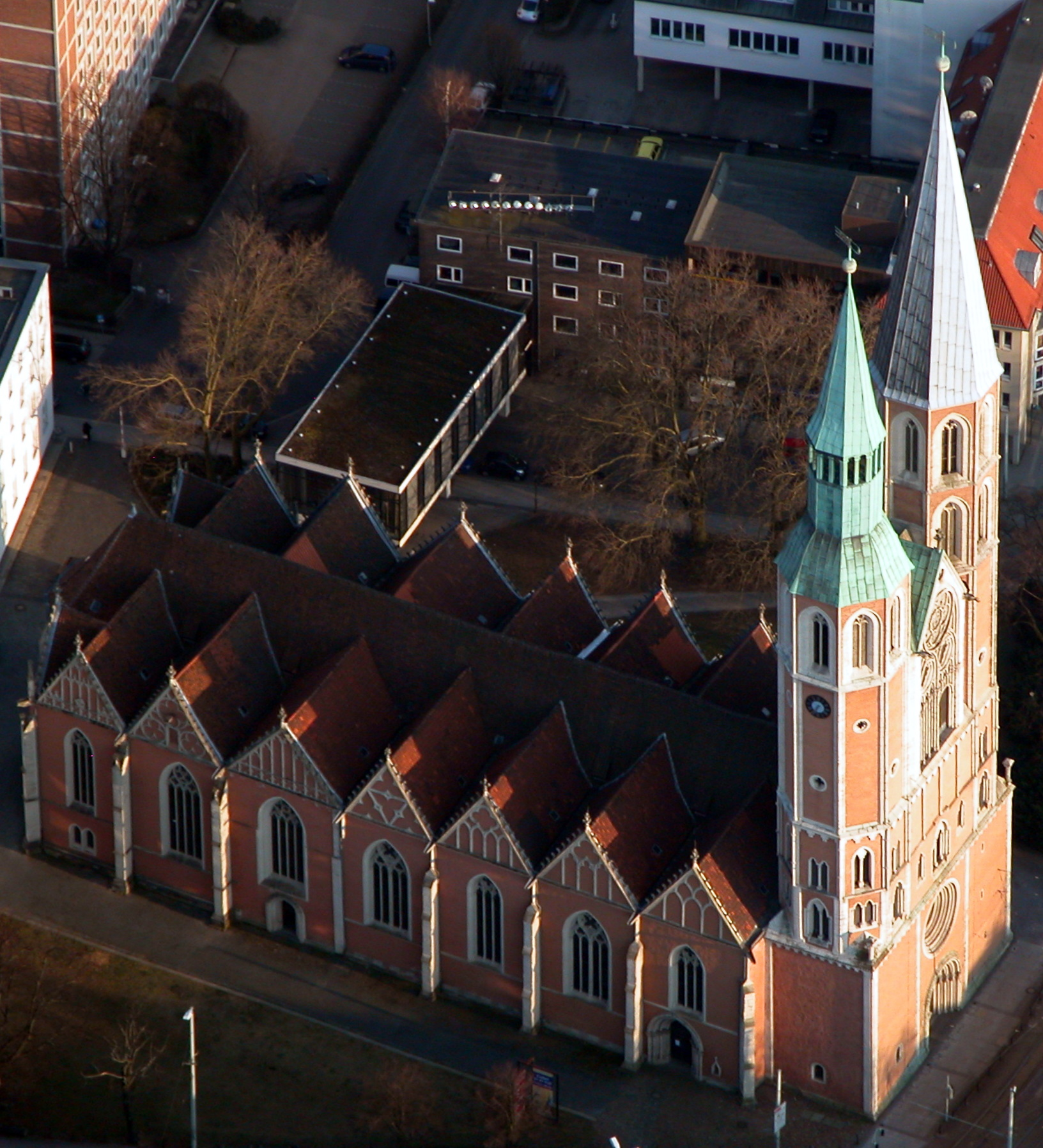 Luftaufnahme Braunschweig: Katharinenkirche von Nordwesten gesehen.